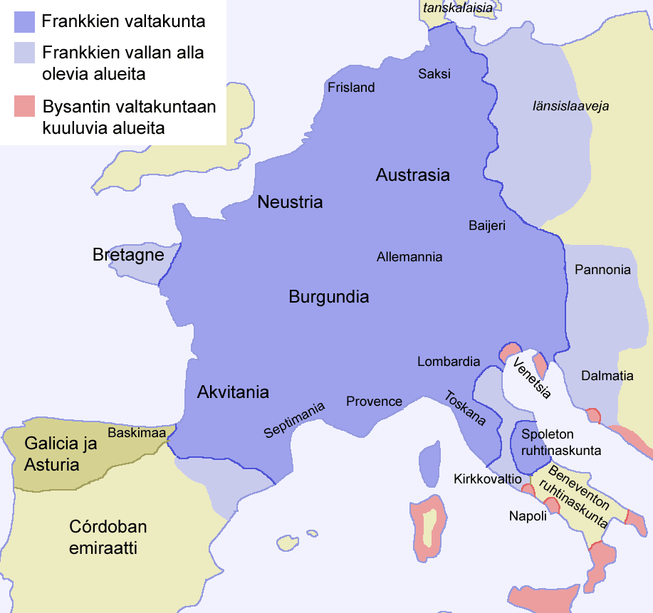 Kaarle Suuren valtakunta